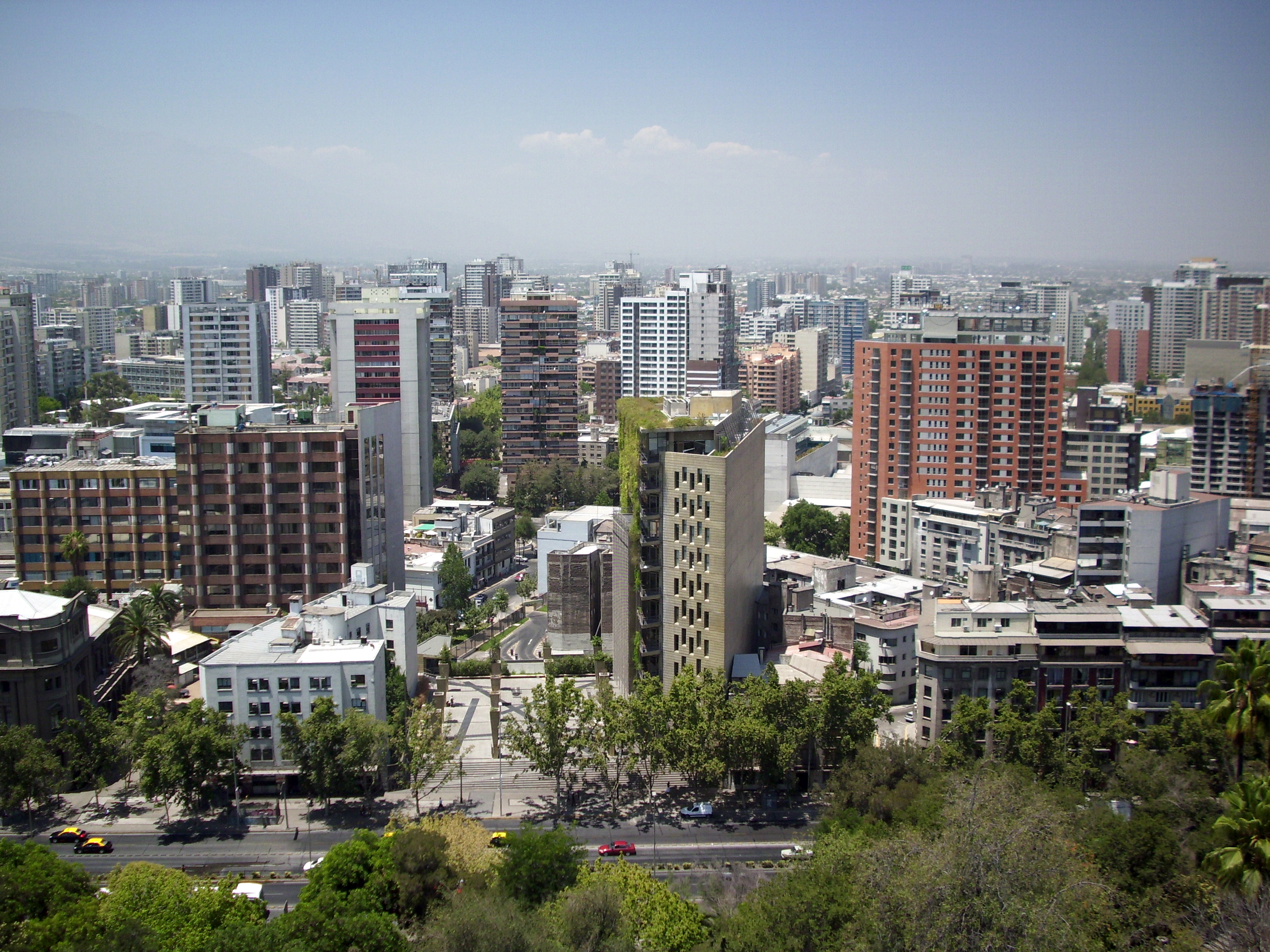 La Avenida del Libertador Bernardo O'Higgins fotografiada desde la cumbre del Cerro Santa Lucía. Santiago de Chile, 13 de enero de 2012.